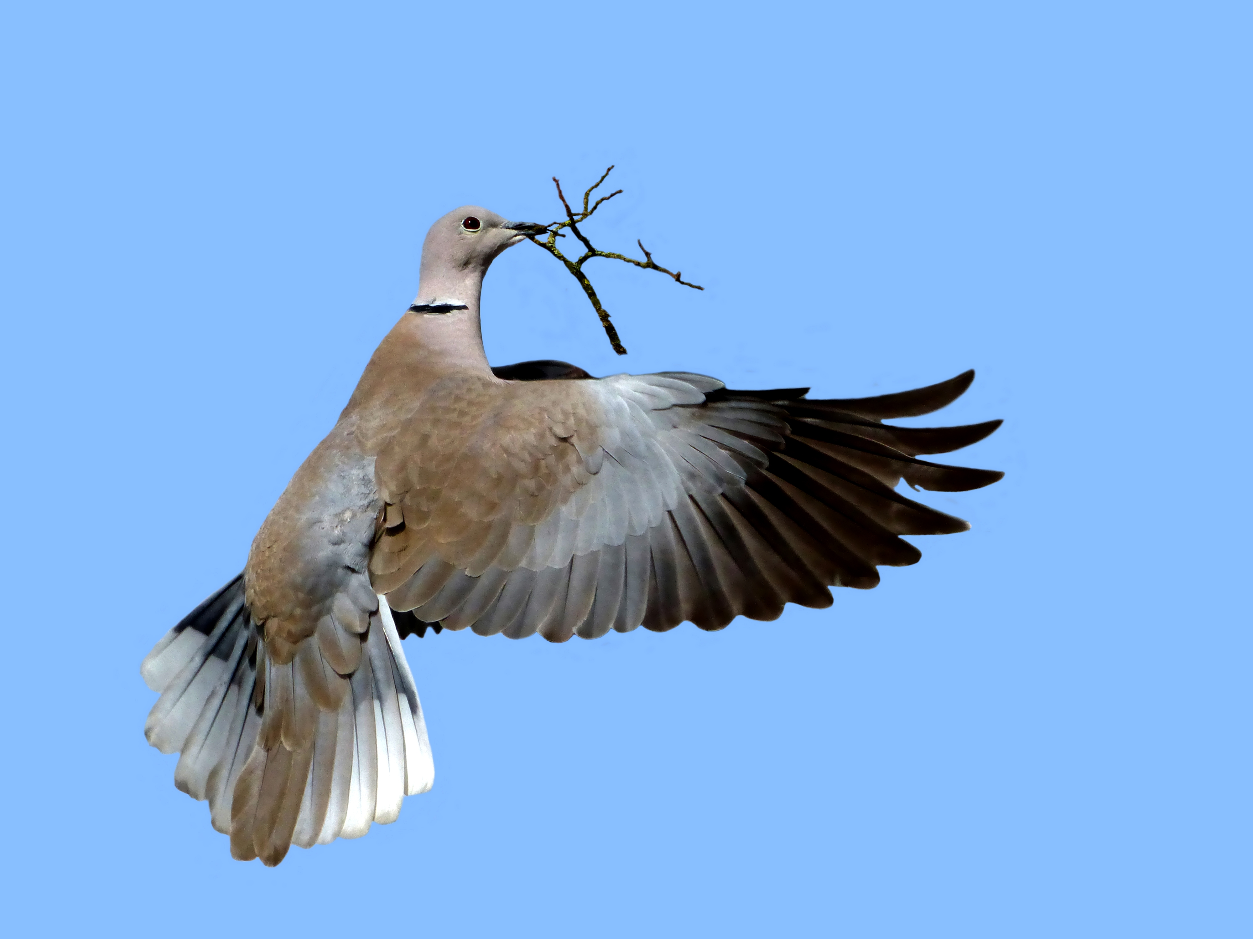 Türkentaube (Streptopelia decaocto) im Flug beim Nestbau, im Landeanflug auf ihr Nest erwischt. Aufgenommen wurde dieses Foto am sog. Sandfang der Berkel (südöstlich des Berkelsees und der B70) im Naturschutzgebiet „Berkelaue II“ (NSG BOR-070) in 48691 Vreden.